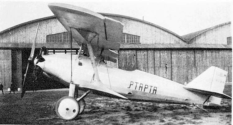 DUS-III Ptapta